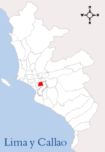 Localización del Distrito de San Borja